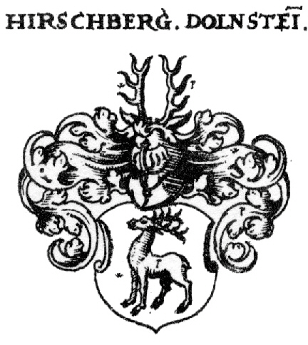 Wappen der europäischen Adelsfamilie Hirschberg-Dollnstein(-Grögling?) - Grafen des Heiligen Römischen Reiches